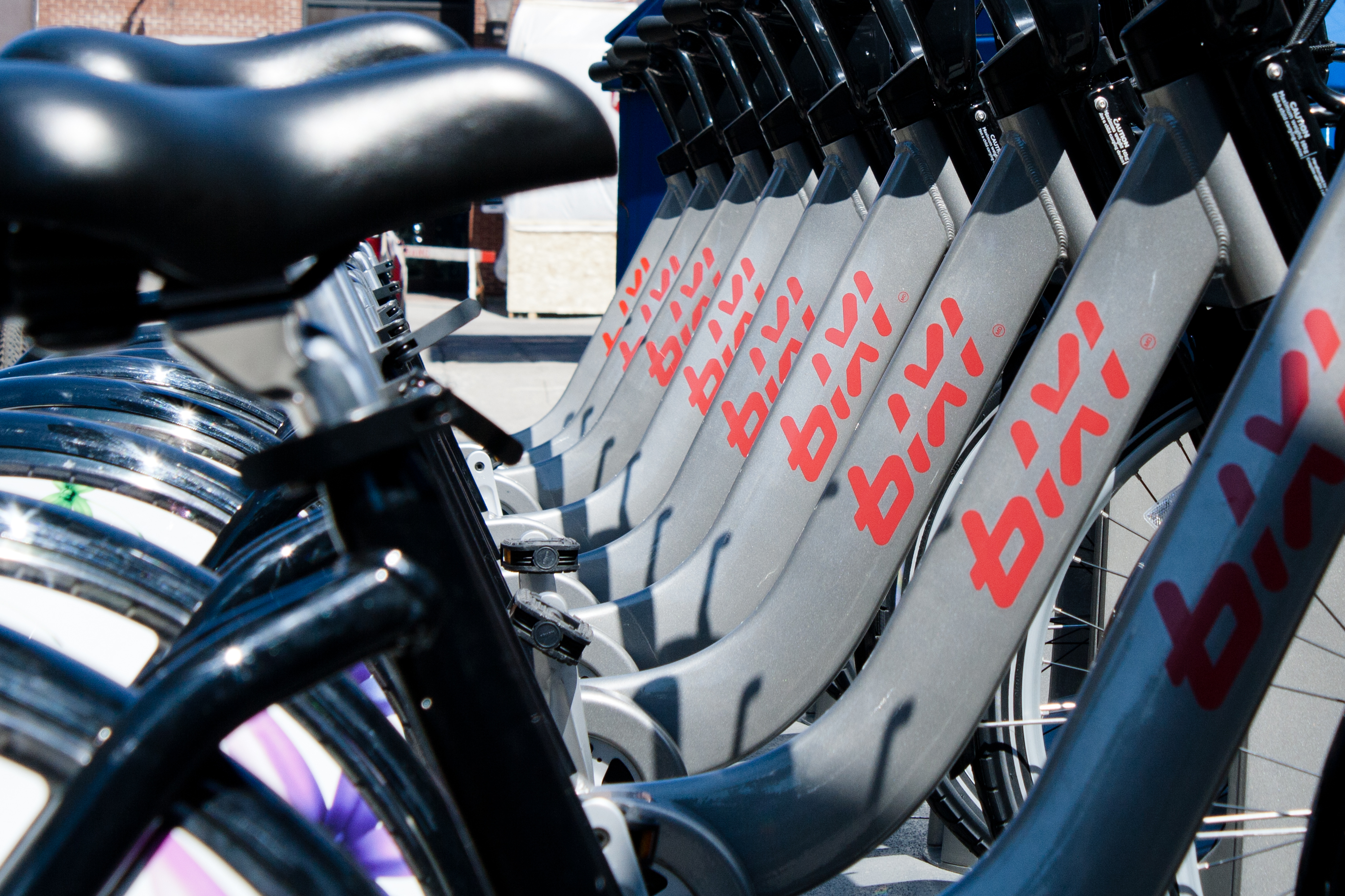 Seule station de vélos libre-service BIXI dans la ville de Québec, située ;a l'angle des rues Saint-Pierre et Saint-Paul dans le Vieux-Québec. La station privée est opérée par l'Hôtel Le Germain-Dominion, situé à proximité depuis 2011.